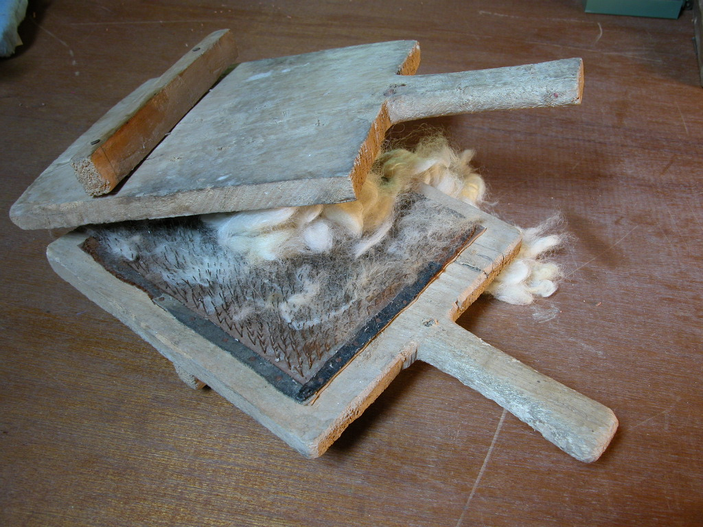 Foto mia personale, vecchi cardacci, 2007 Licensing Categoria:Immagini sulla tessitura